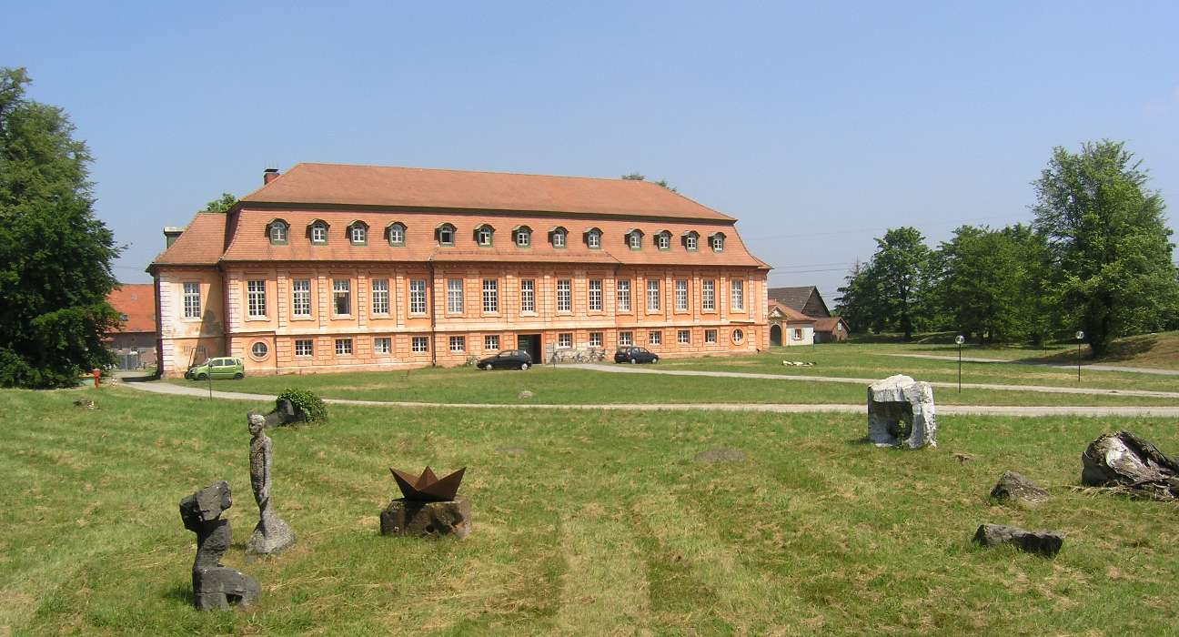 Skulpturengarten beim Gut Scheibenhardt